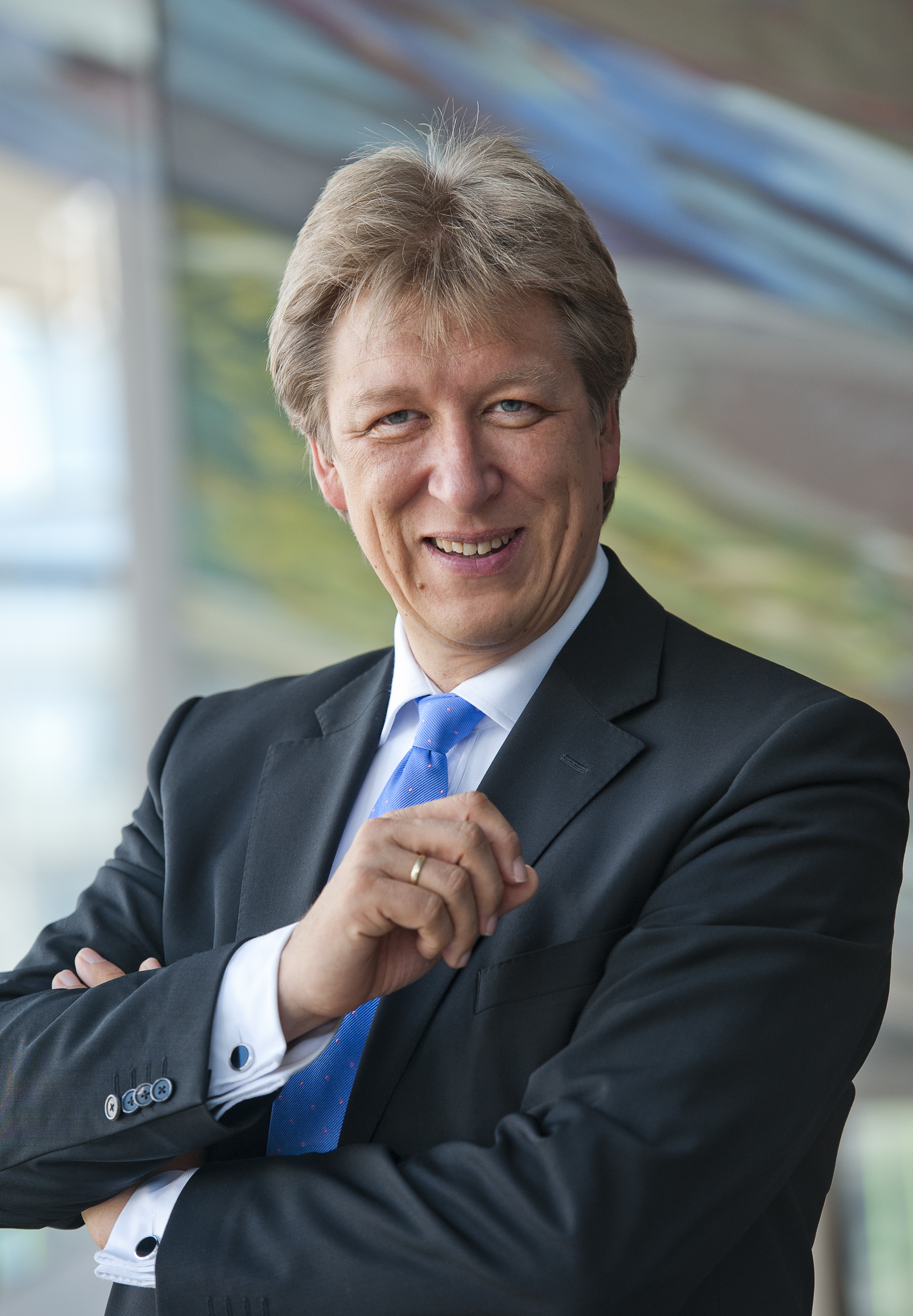 Gewandhausdirektor Prof. Andreas Schulz, Gewandhaus zu Leipzig